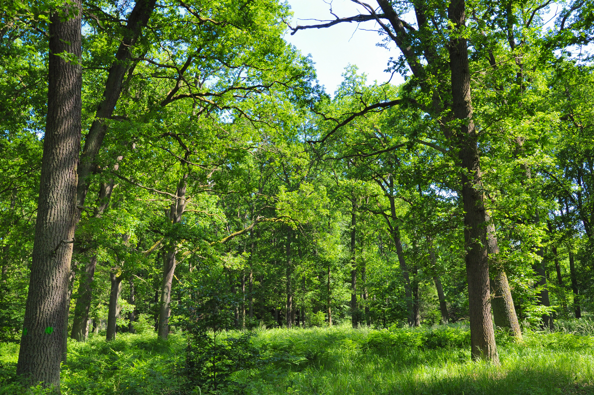 Naturschutzgebiet Kienhorst/Köllnseen/Eichheide: Große Teile des Gebietes werden von lichten, krautreichen Wäldern geprägt.